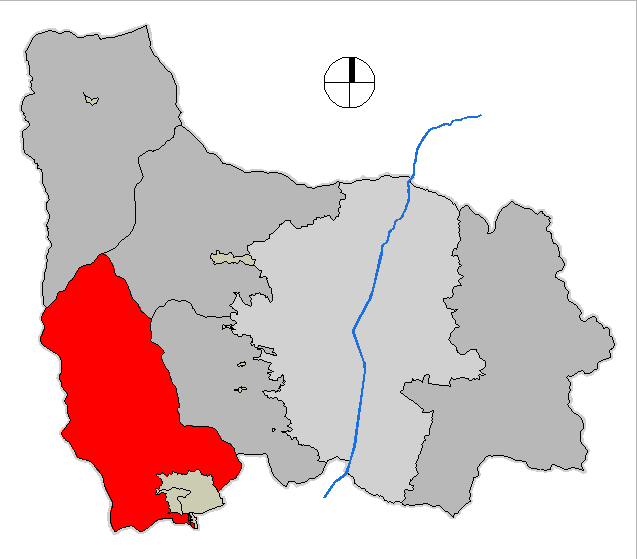 mapa del Corregimiento de San Antonio de Prado. Medellín, Colombia.